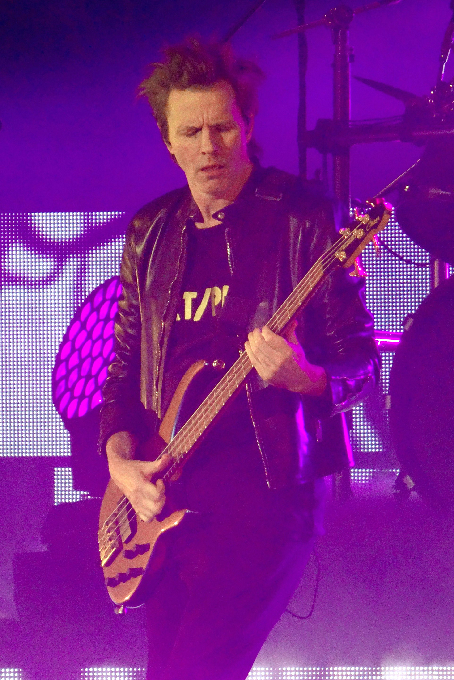 John Taylor, a bassist for Duran Duran. Bournemouth, England.